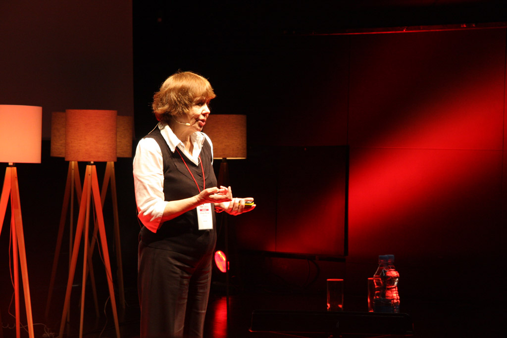 Viive-Riina Ruus esinemas TEDxTallinn konverentsil 2009. aastal. [1]